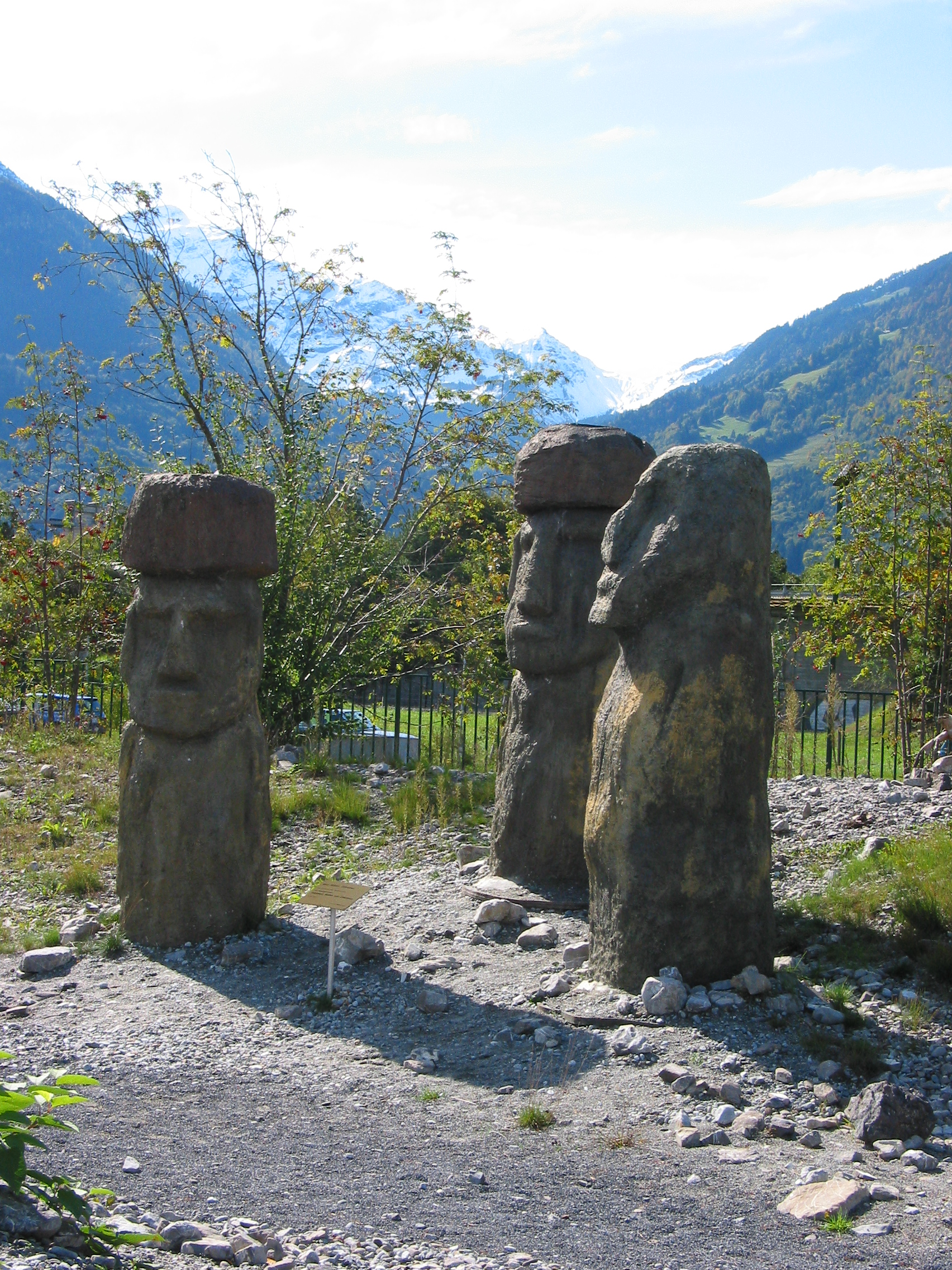 Steinmonumente Mystery Park Interlaken